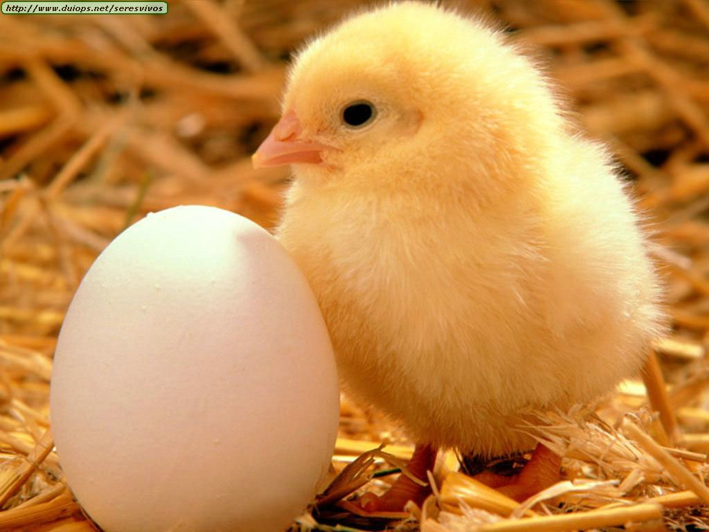 pollito